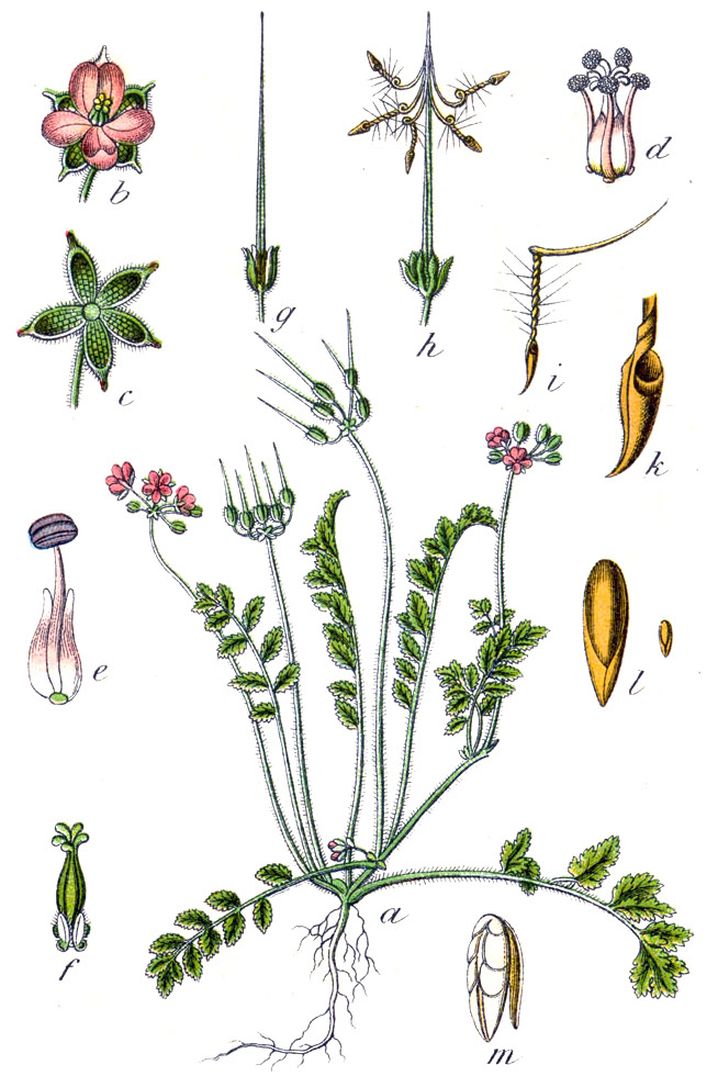 Erodium moschatum (L.) L'Hér. Original Caption Moschus-Reiherschnabel, Erodium moschatum